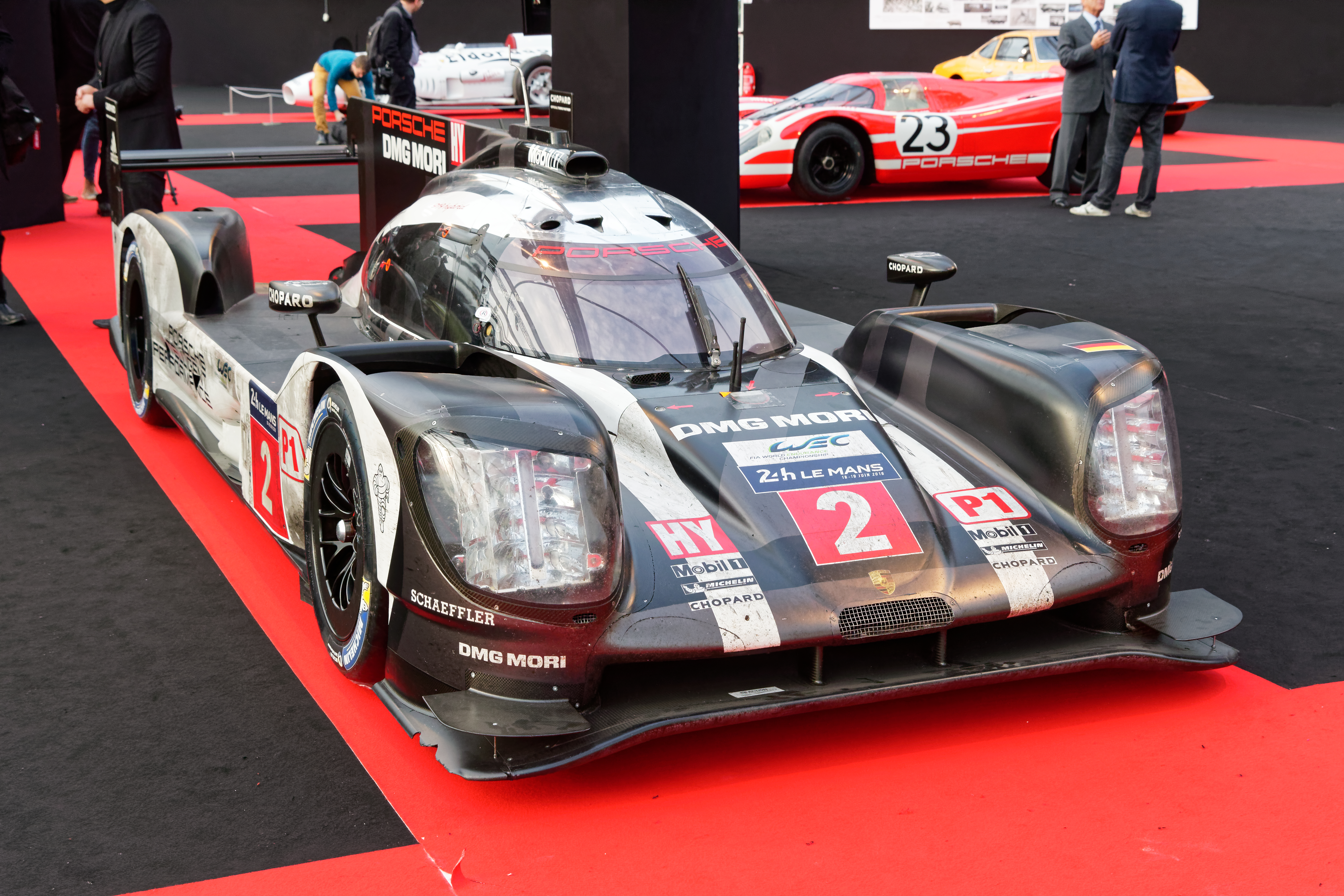 La Porsche 919 Hybrid exposée lors du festival automobile international 2016.